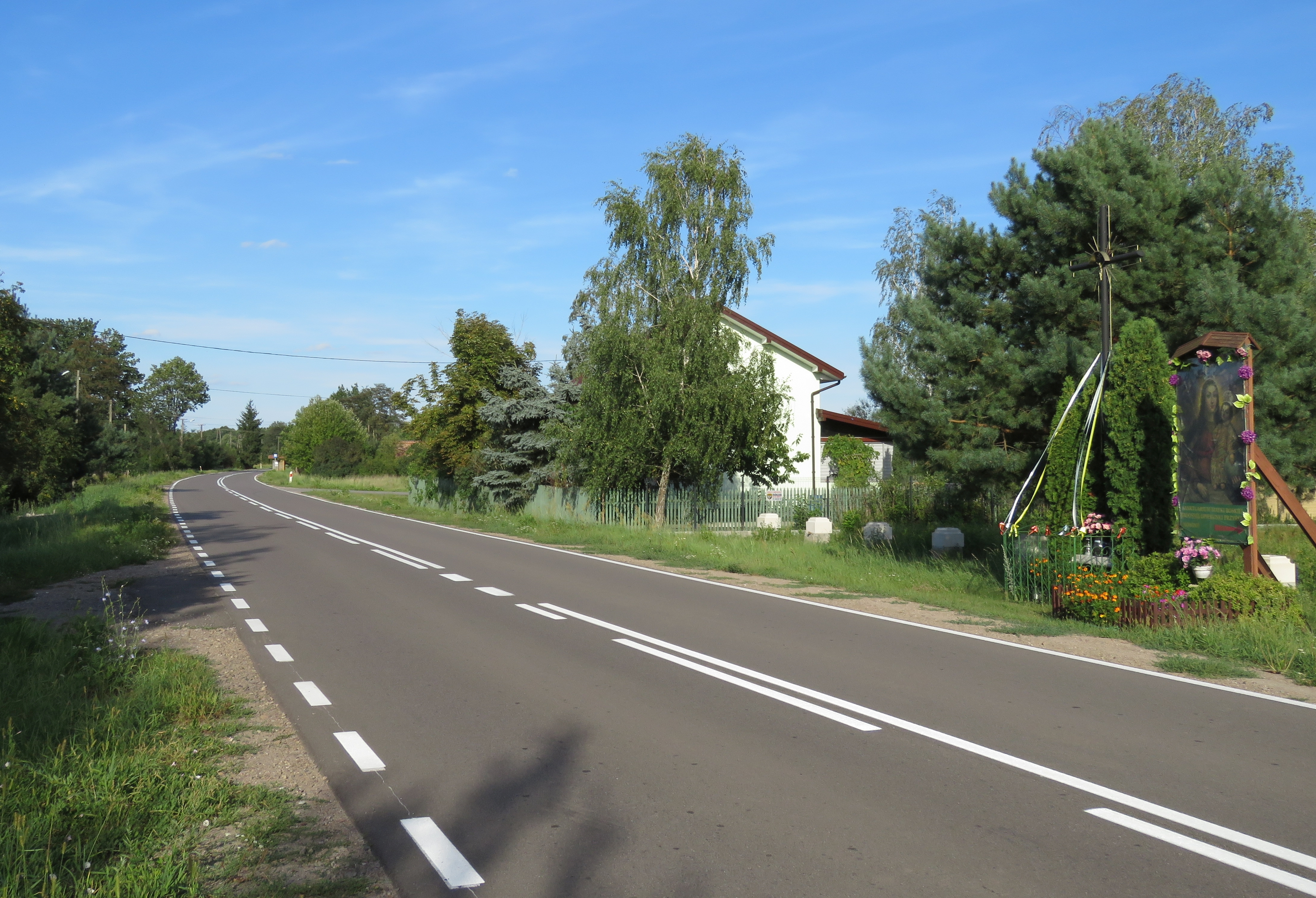 SECYMINEK